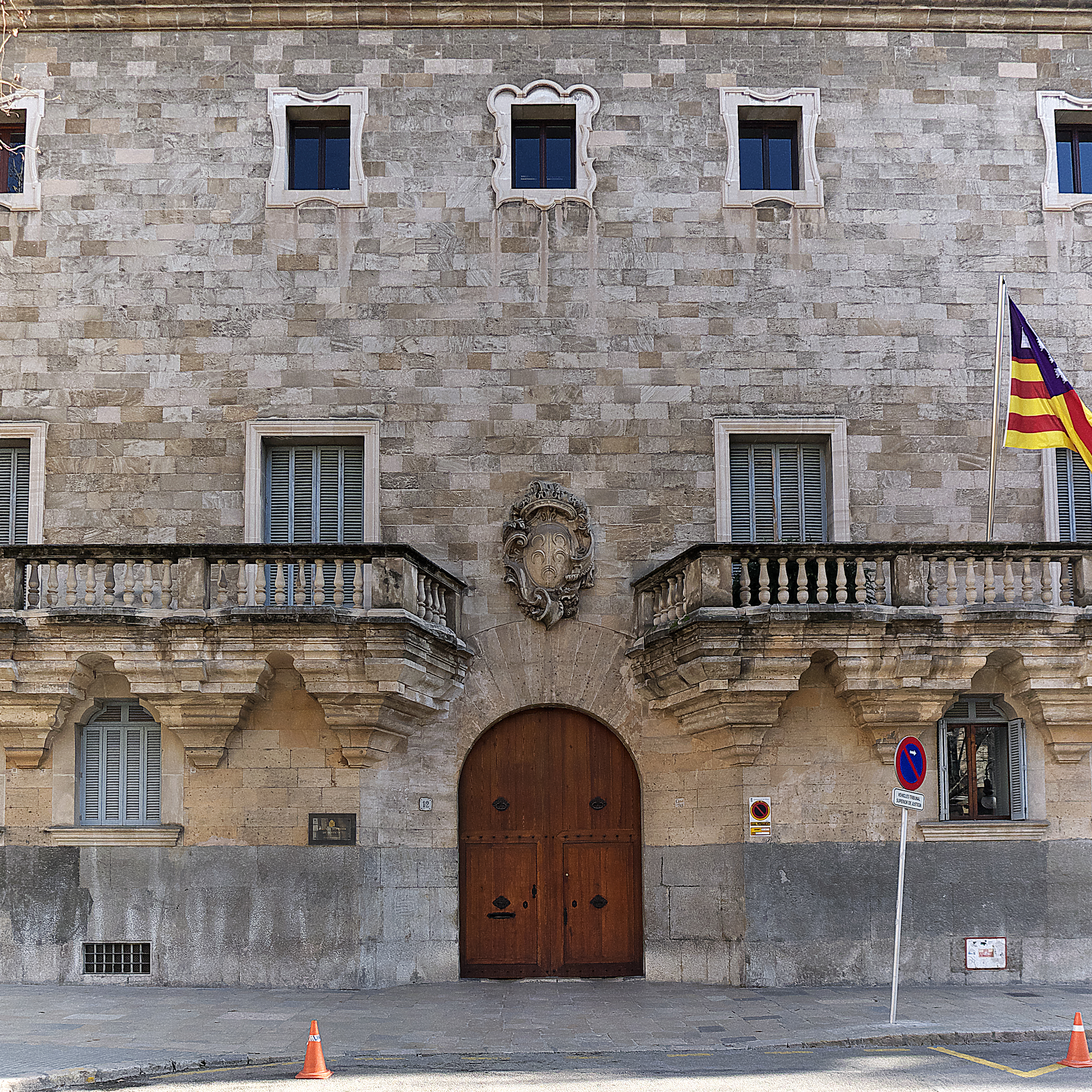 Gabriel de Berga y Santacília adquiere este edificio (1677)